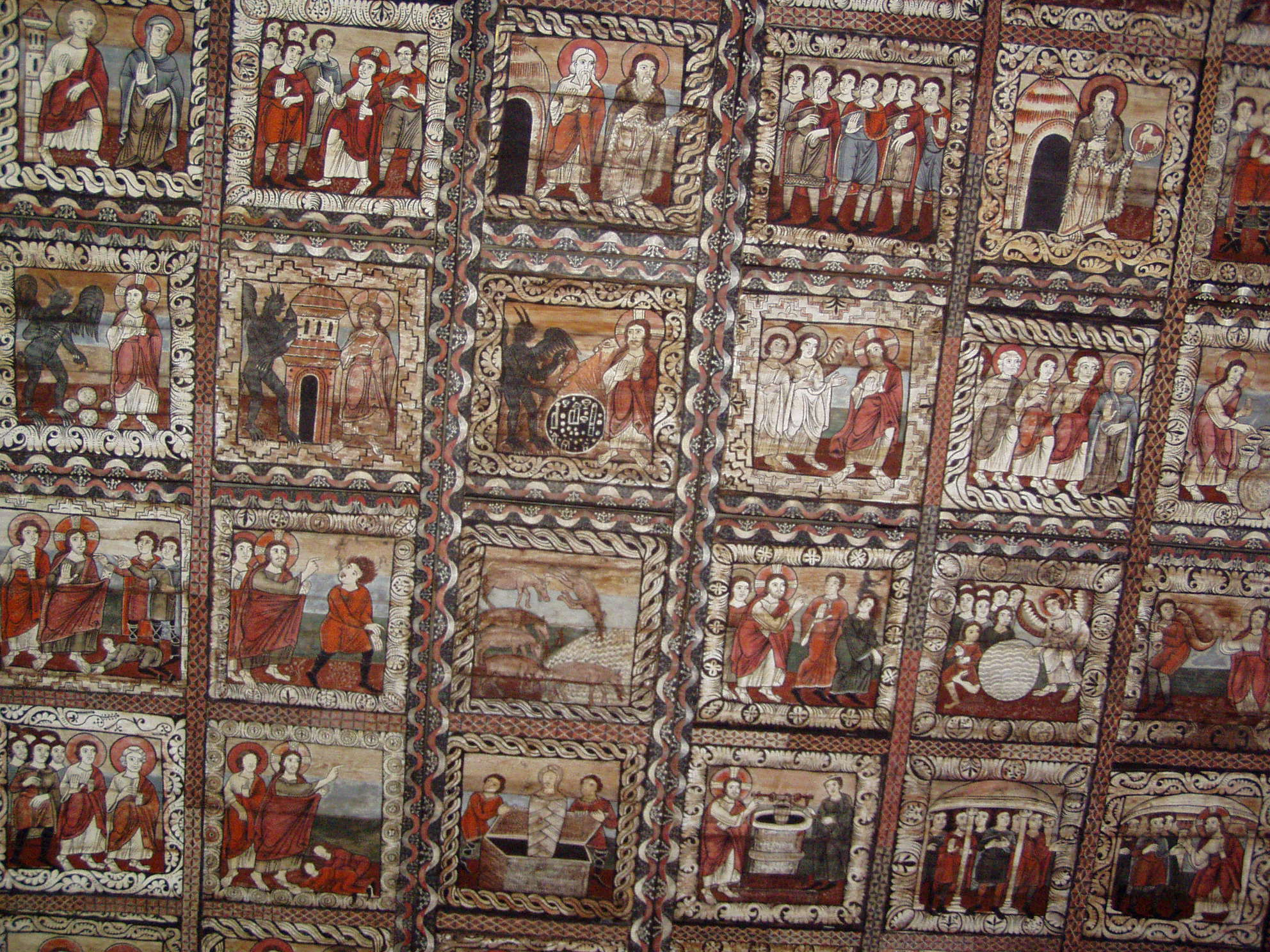 Plafond peint de l'église Saint-Martin à Zillis-Reischen (Suisse)